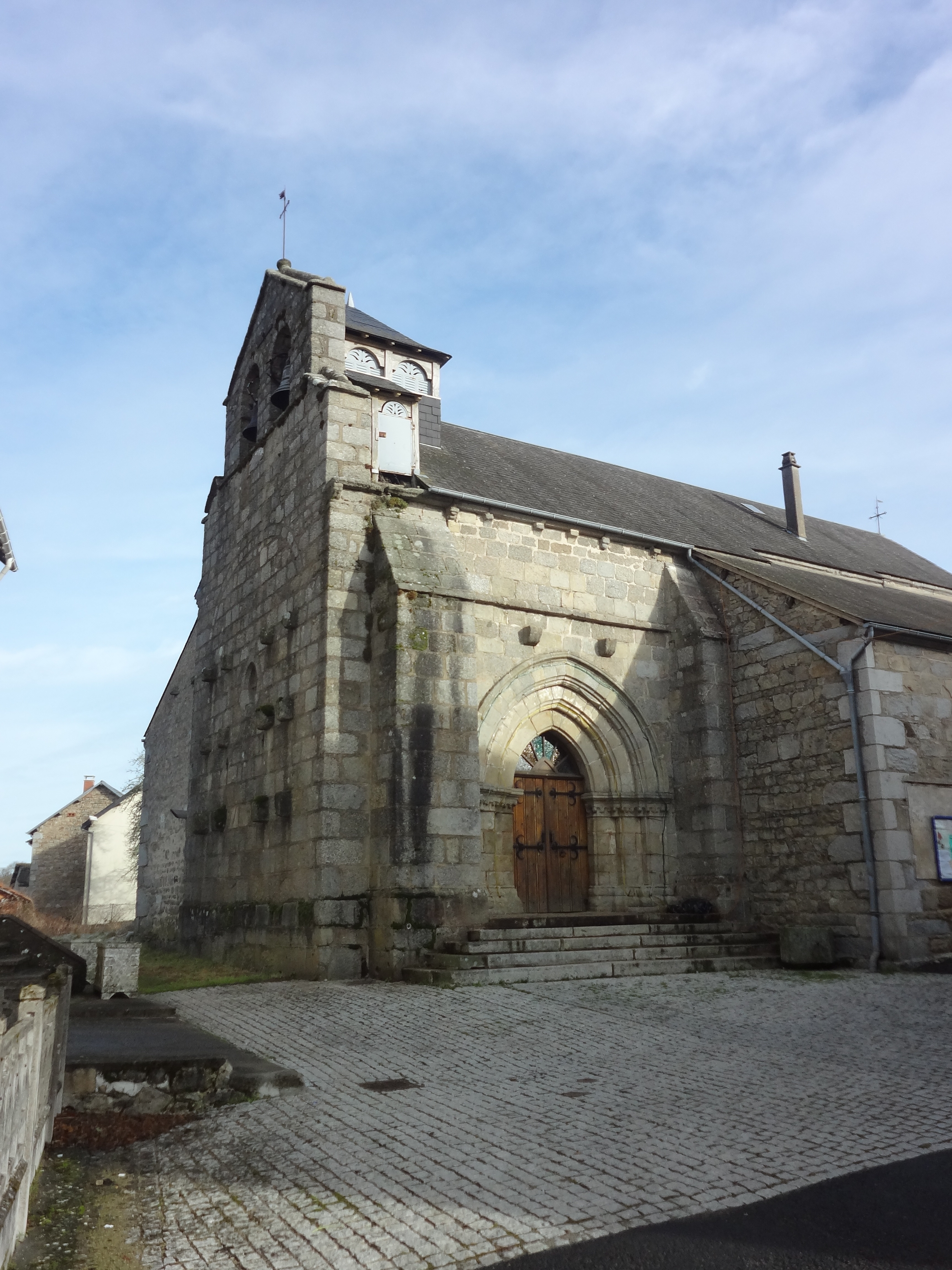 Façade occidentale et portail sud de l'église de Saint-Avit (63).